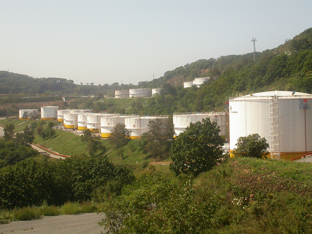 Nakhodka, Autumn, 2003, Rosneft oil terminal